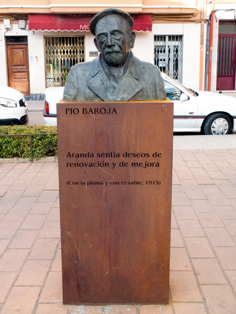 Busto del escritor Pío Baroja, instalado en el centro de la ciudad de Aranda de Duero, Burgos, España